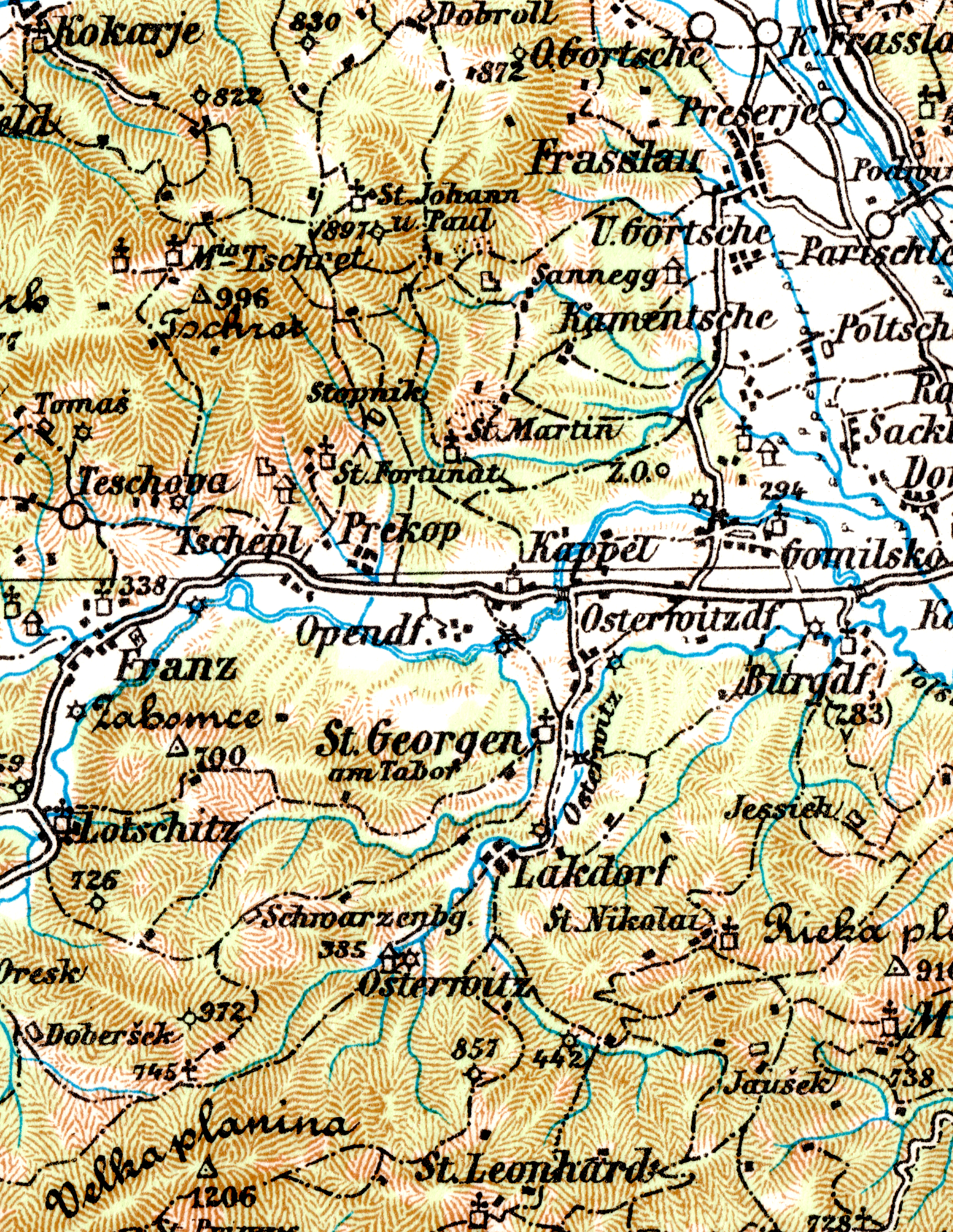 Lage der Burgen von Osterwitz und Sanneck im Westen des Beckens von Cilli: Stammland der Grafen von Cilli im 13. und 14. Jahrhundert